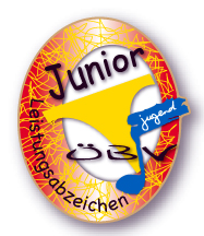 Junior-Leistungsabzeeichen